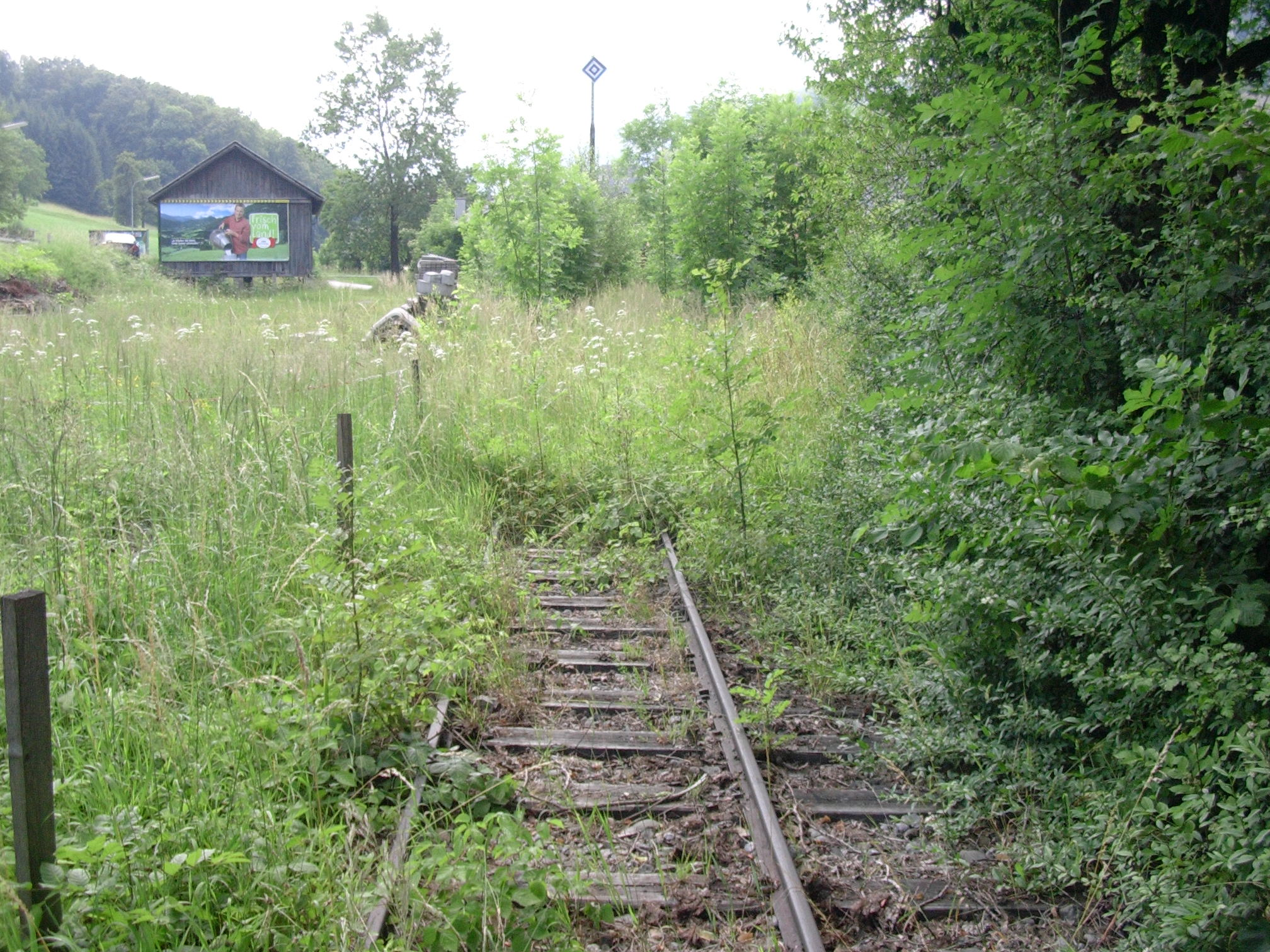 Blick auf das verwucherte, ehemalige Umladegleis der Straßenbahn Gmunden